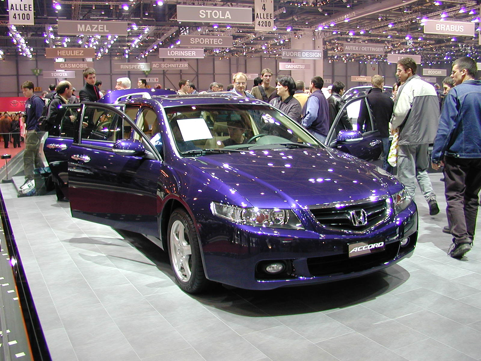 Salon de Genève 2004 SAG2004 131 Honda Accord